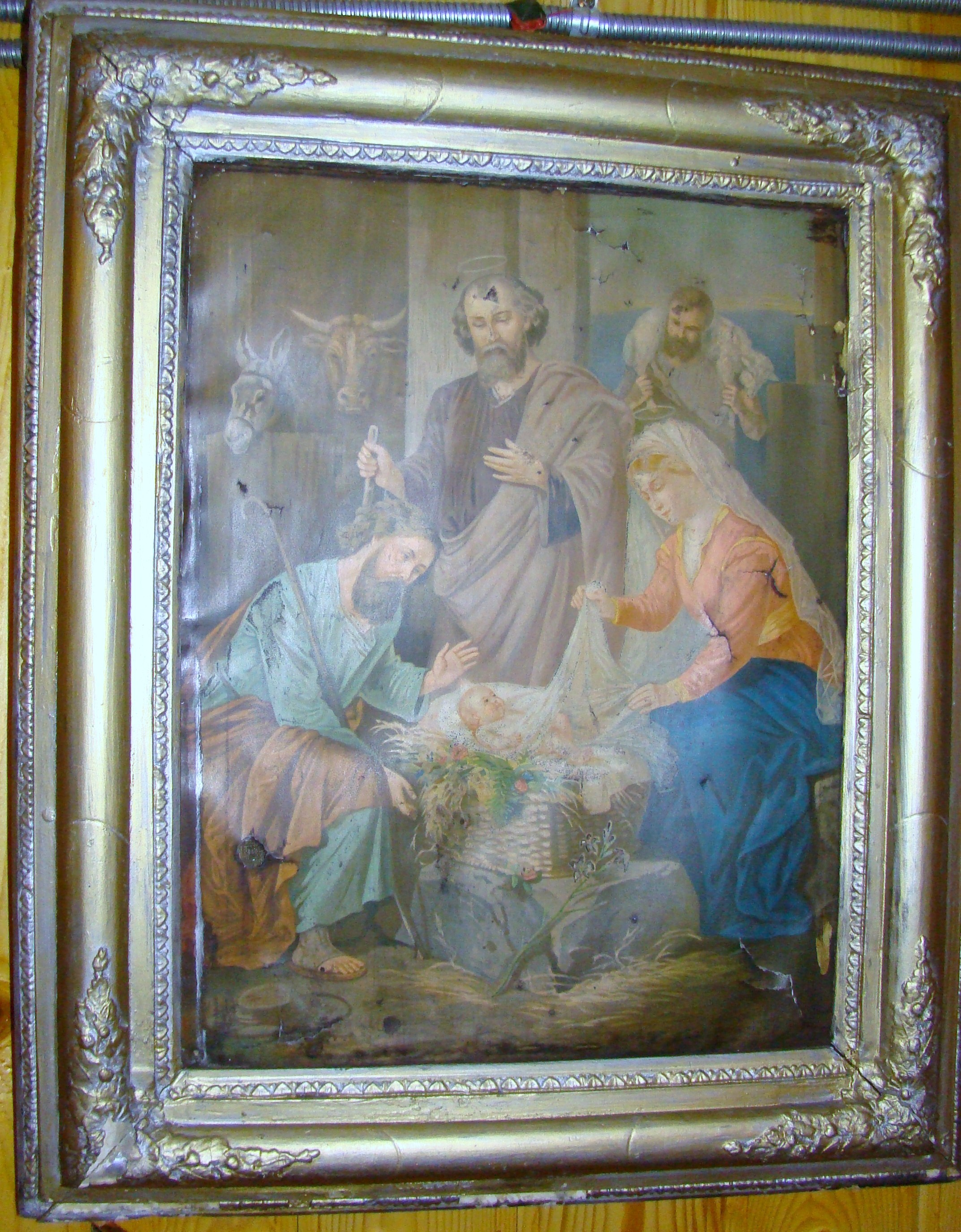 Biserica de lemn "Sfinții Arhangheli Mihail şi Gavriil" din Pădureni, județul Cluj